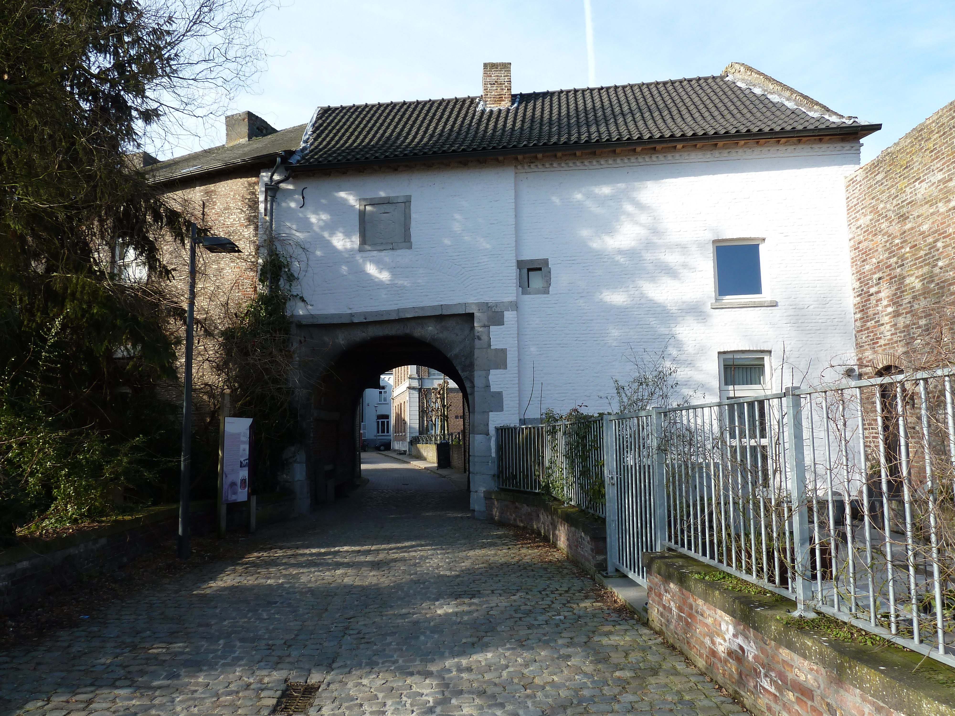 Uikhoverpoort, Oud-Rekem, België